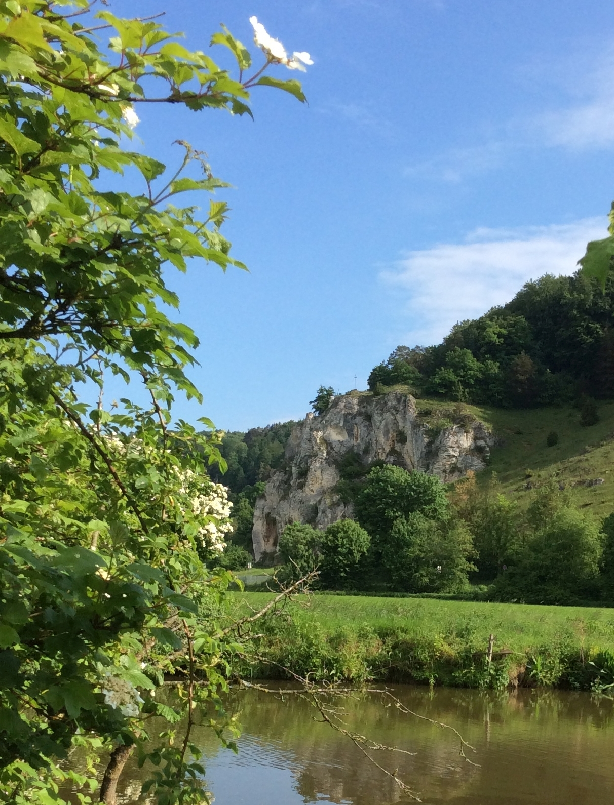 Maderfelsen am Ortsrand von Dollnstein im Altmühltal, Felsturm/-nadel, Geotop 176R019, im Vordergrund die langsam fließende Altmühl